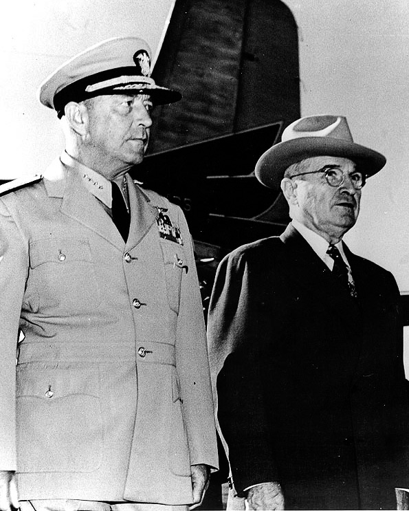 President Harry S. Truman (right) with Admiral Arthur W. Radford, USN, Hickam Air Force Base, Honolulu, October 1950